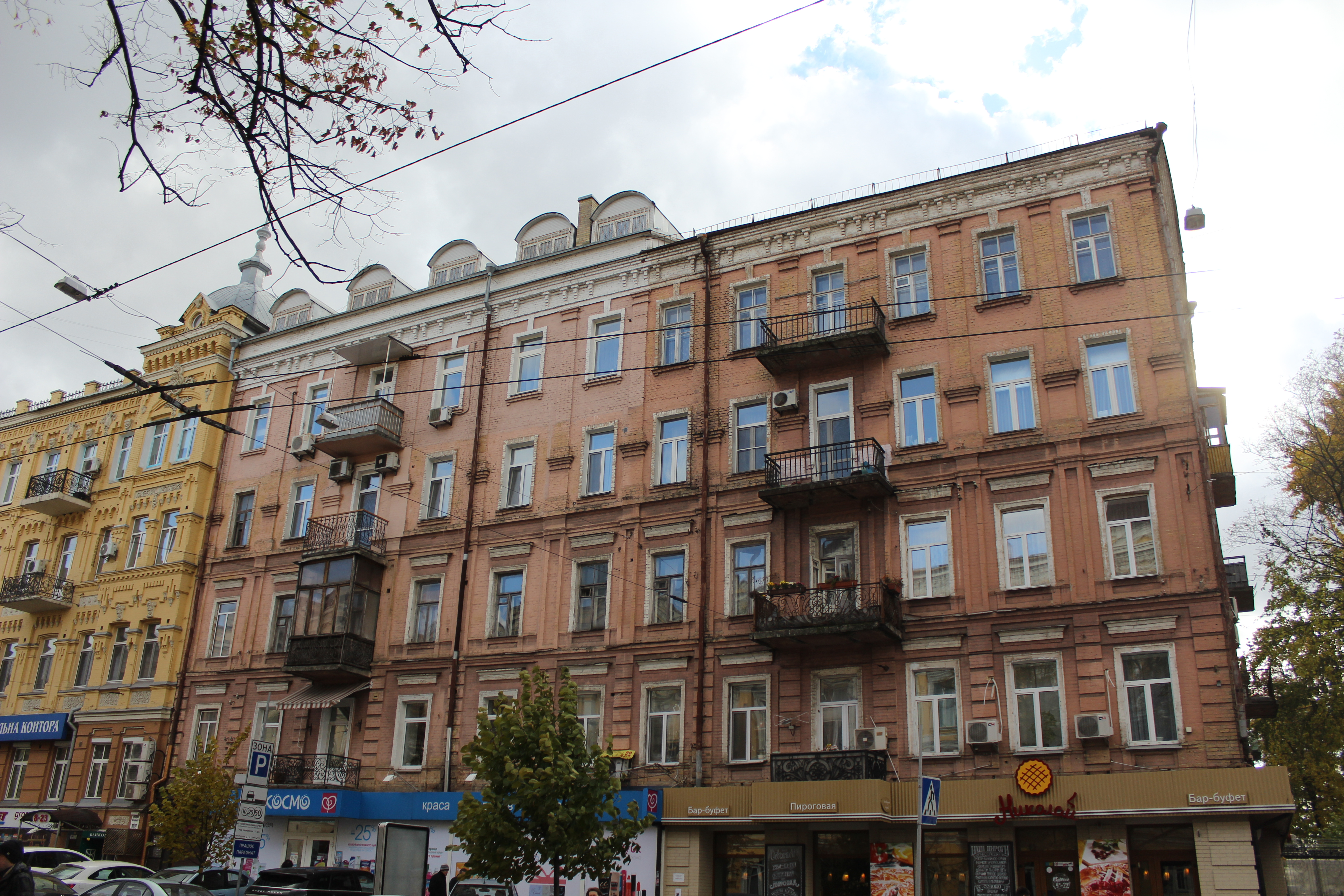 Будинок, в якому мешкав Зіньківський В. В., філософ, психолог, педагог, міністр віросповідань Української Держави, Київ, Хмельницького Богдана вул., 35/1